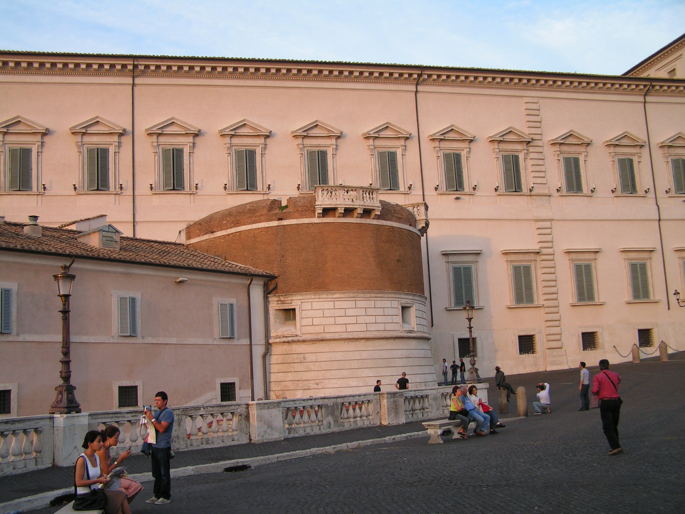 Residència del president de la República.